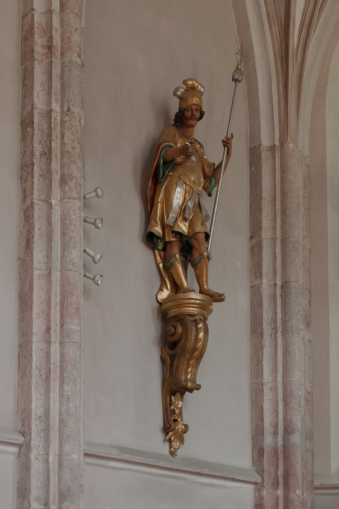 Wiki takes Nordtiroler Oberland: Haiming, Kath. Pfarrkirche hll. Chrysanth und Daria